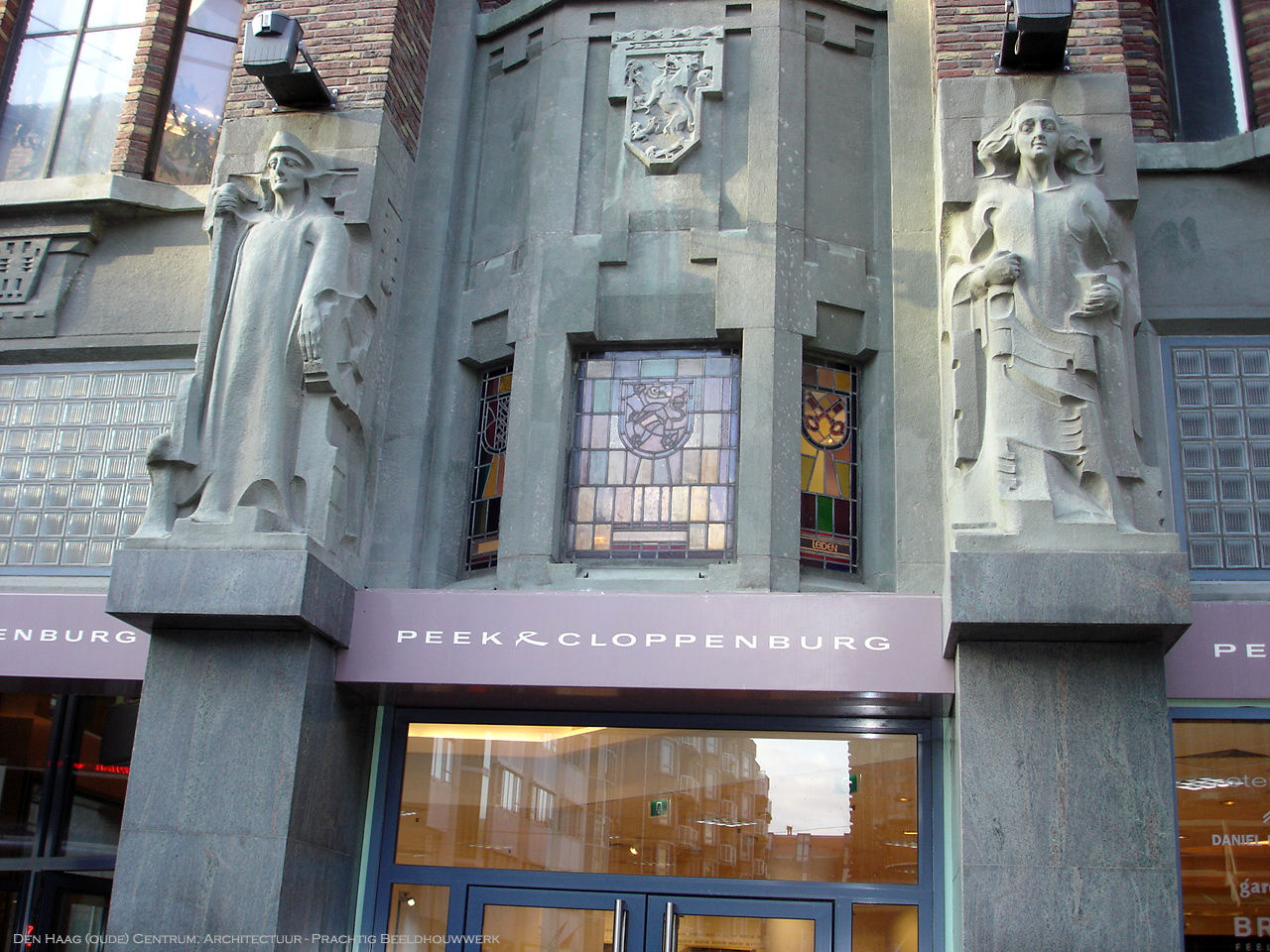 Zelfgemaakte media